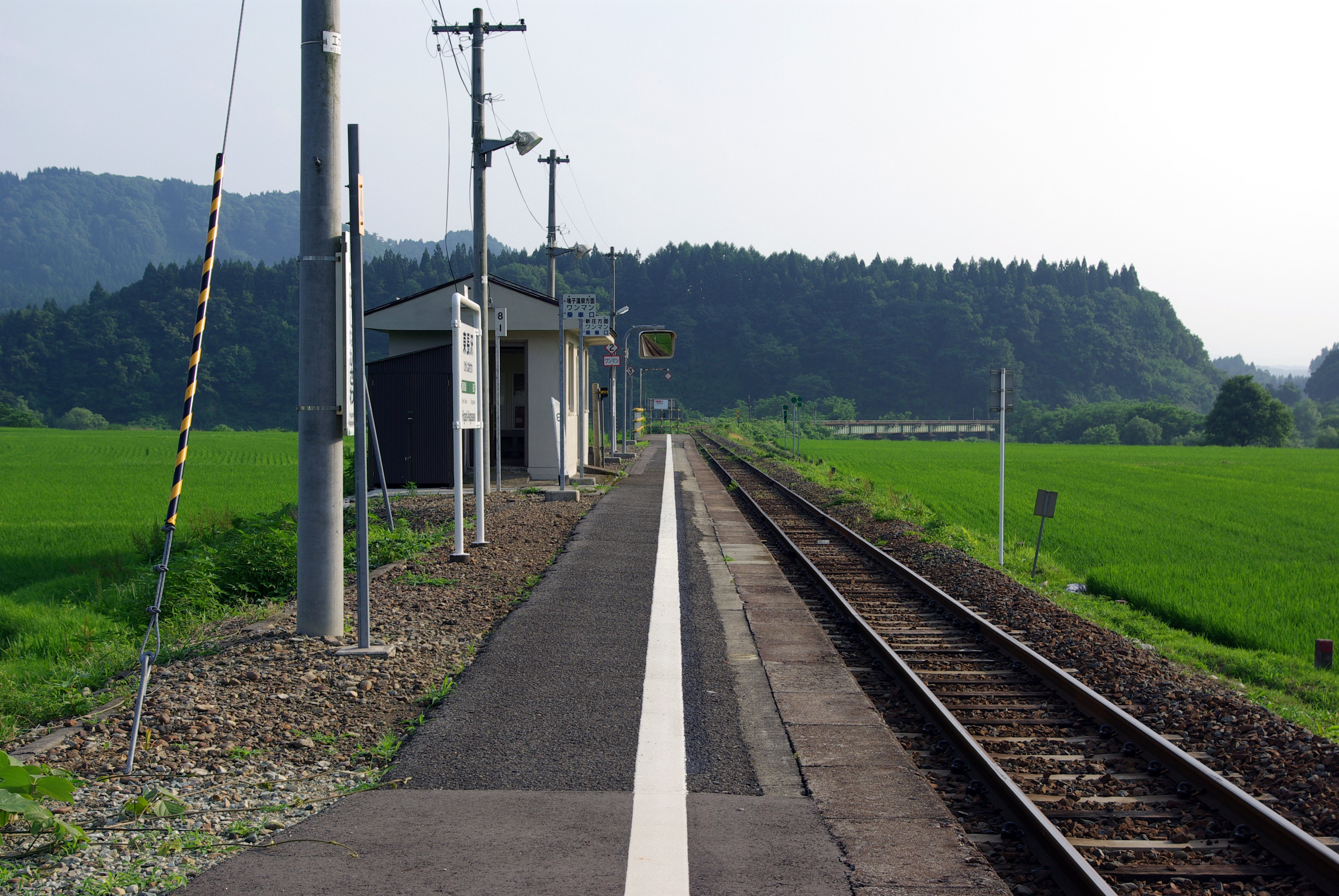 JR陸羽東線東長沢駅